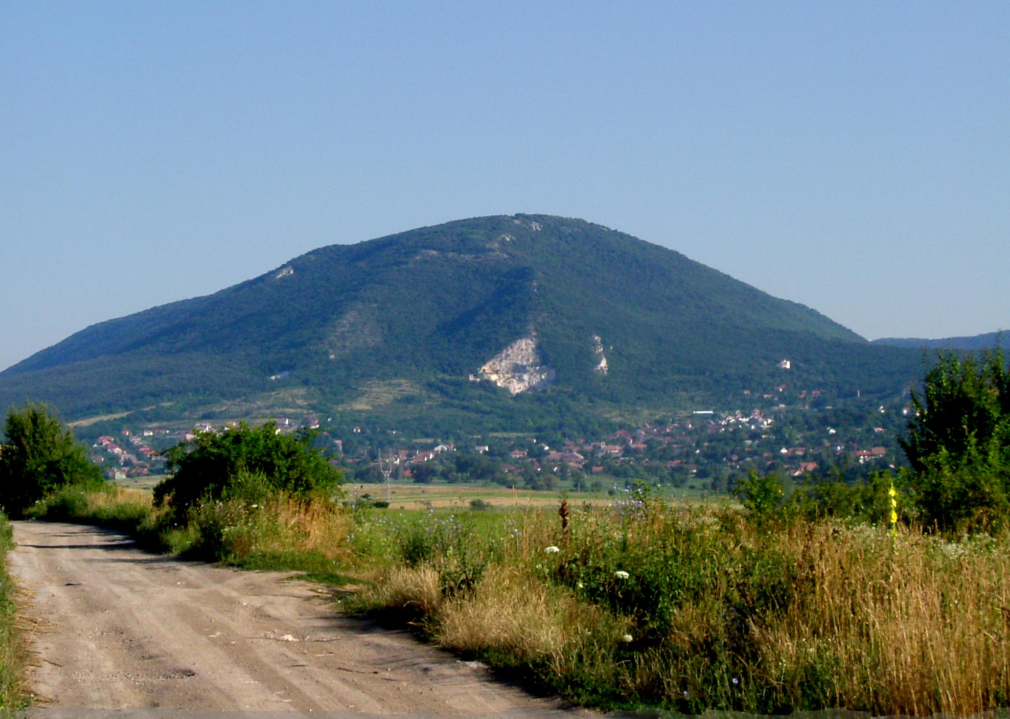 Pilis - peak, Pilisszántó village (Pilis-csúcs Pilisszántó községgel. Saját felvételem, PhotoShop 6.0-al javítva)